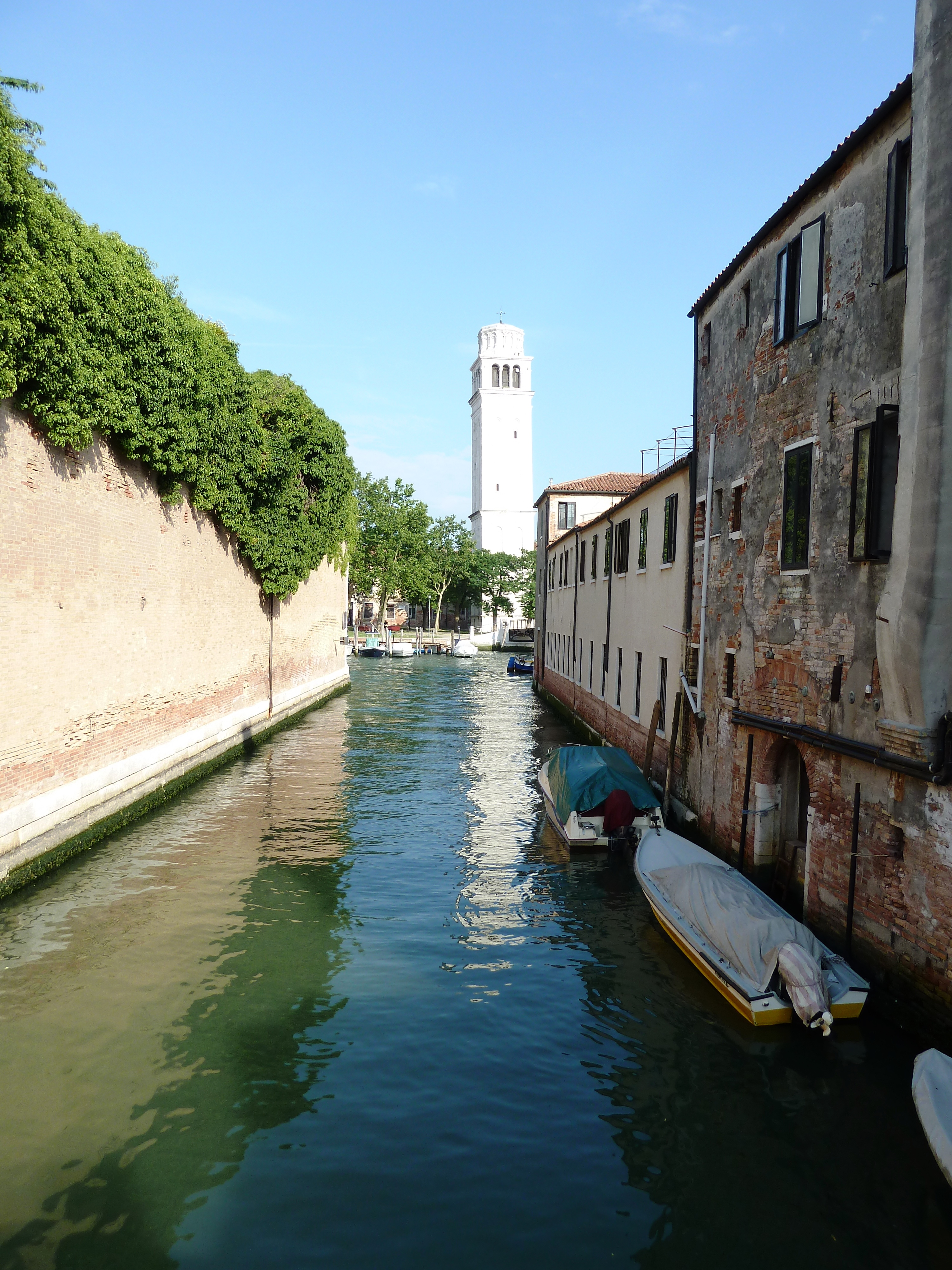 Rio delle Vergini (Venice)